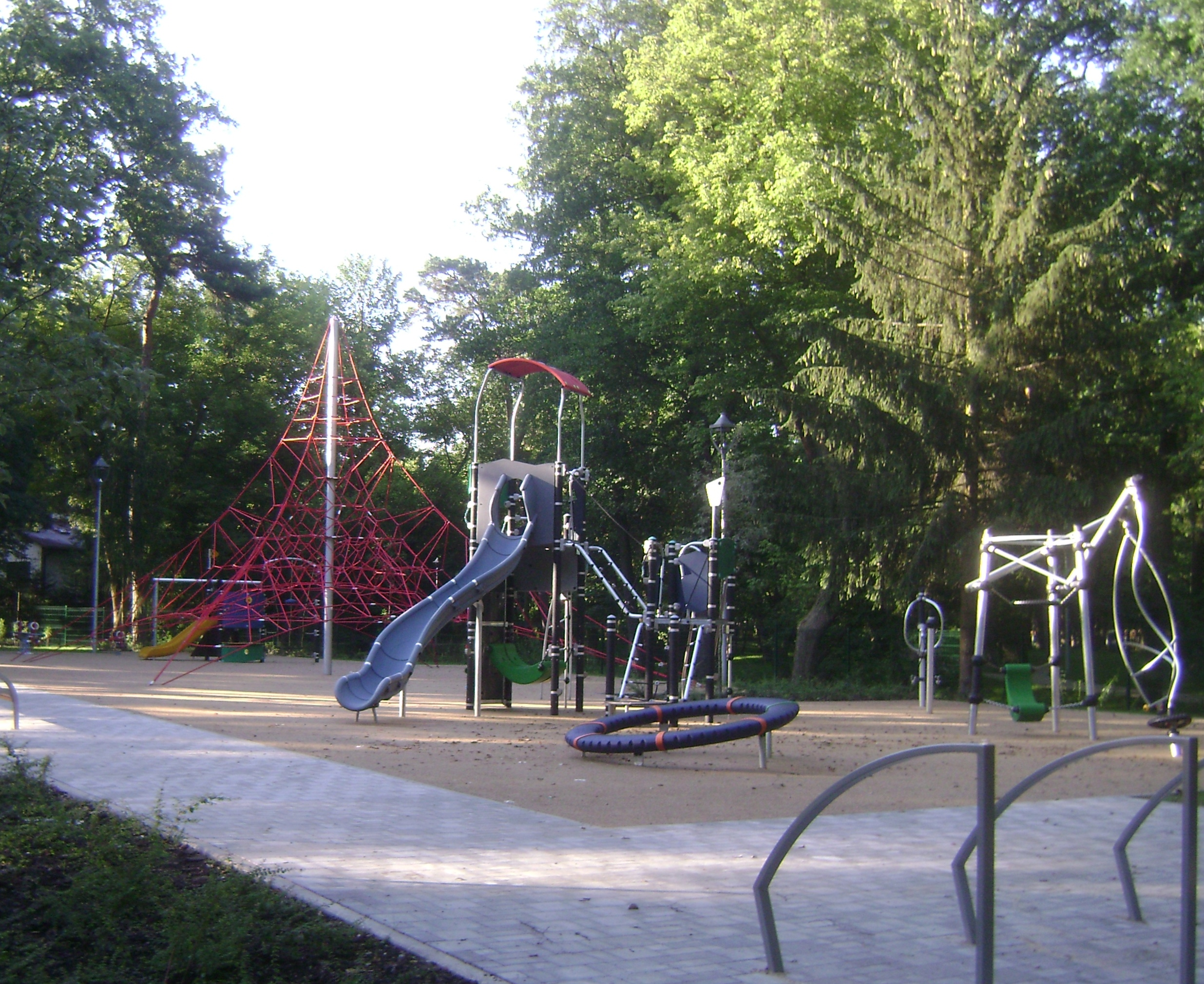 Konstancin-Jeziorna